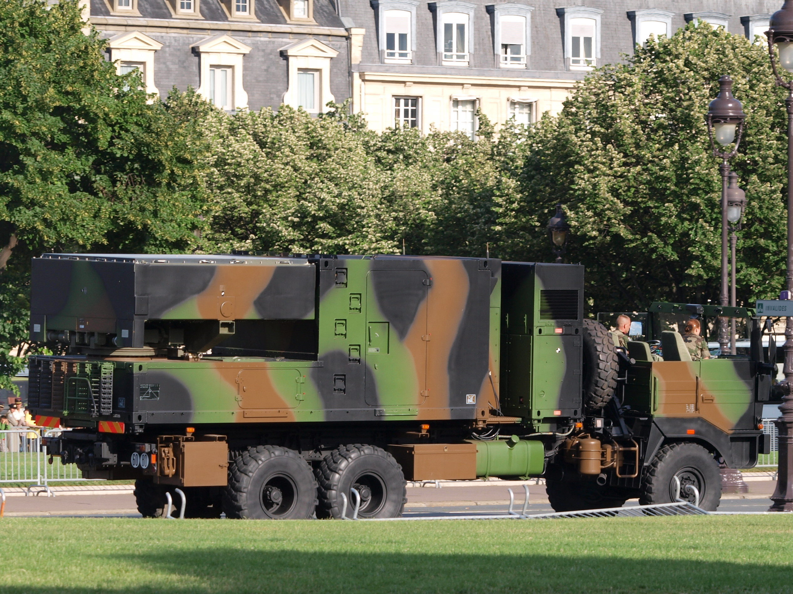 Renault GBC 180